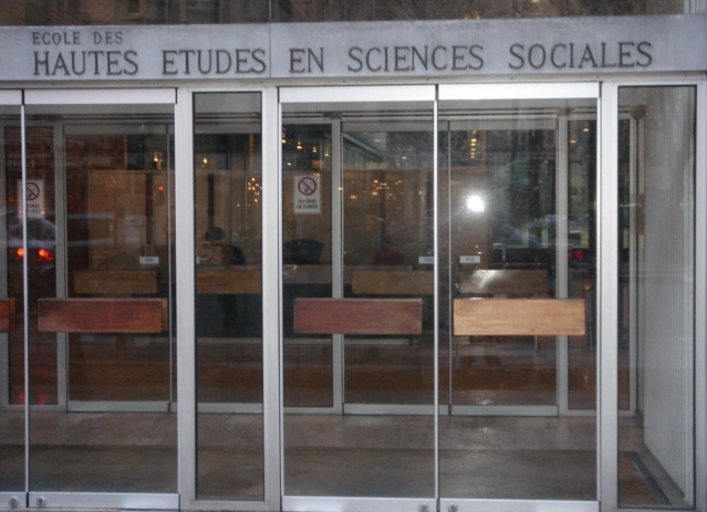 Maison des sciences de l'homme, Paris, porte d'entrée administration et centres de recherche de l'EHESS.